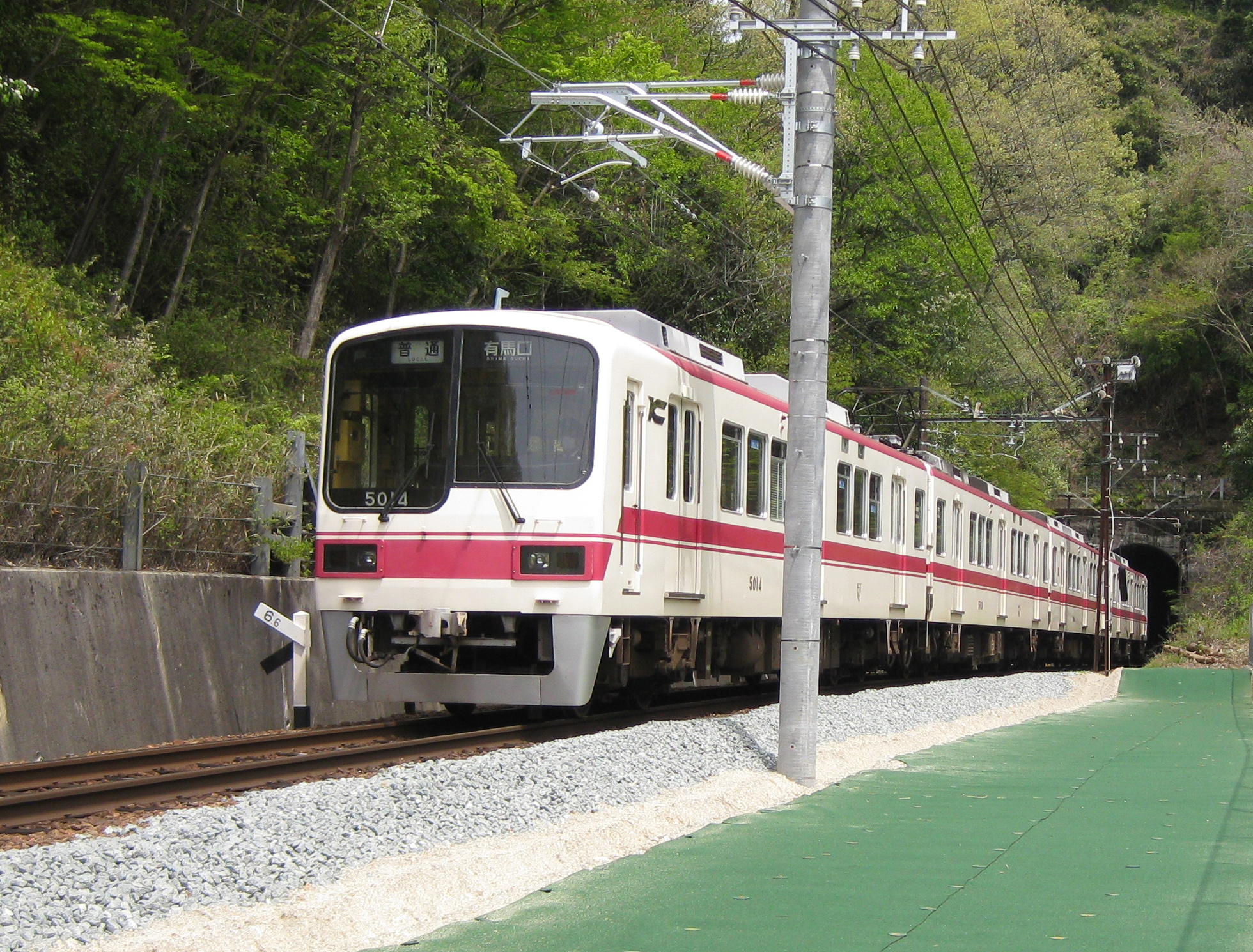 新有馬駅跡付近を走行する5000系有馬口行き